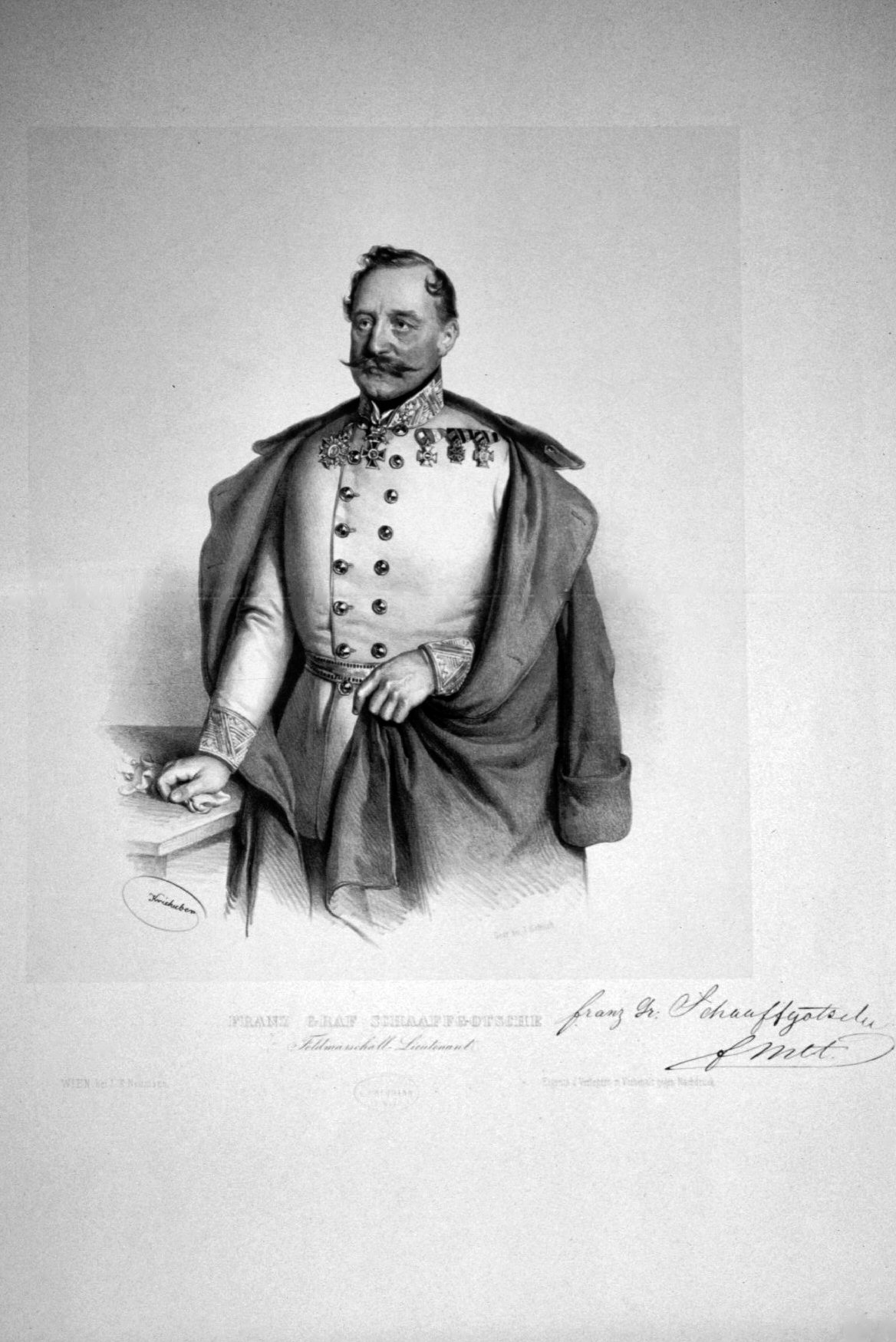 Johann Franz Graf Schaaffgotsche (1792-1866), General der Kavallerie. Lithographie von Josef Kriehuber, 1850